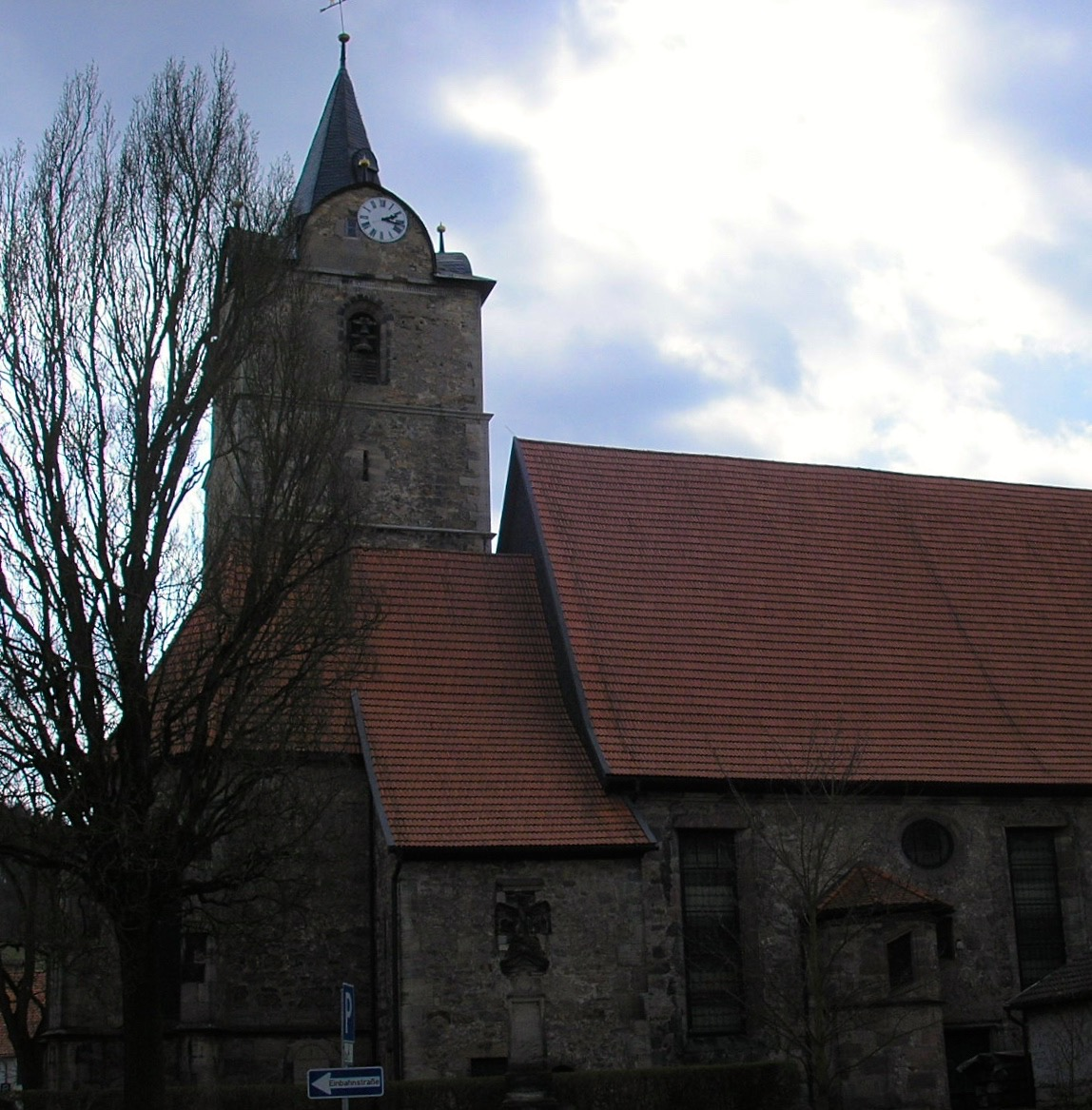 Die Stadtkirche von Themar (Thüringen).